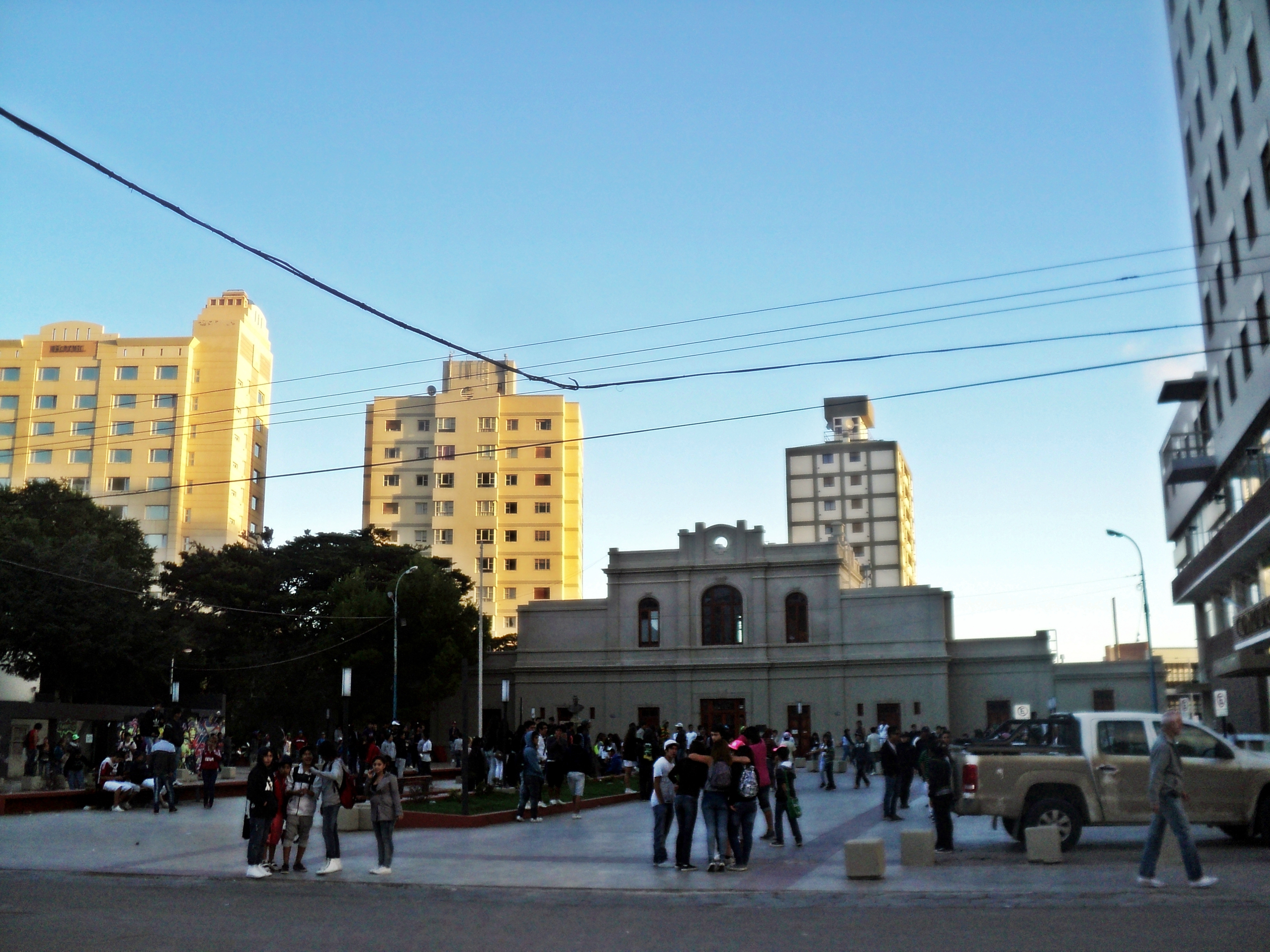 La antigua estación hoy con una plazoleta, es todo un lugar de reunión para la juventud de la ciudad